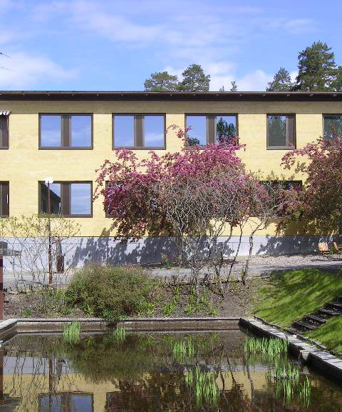 En del av musikhögskolans byggnad och "borggård".